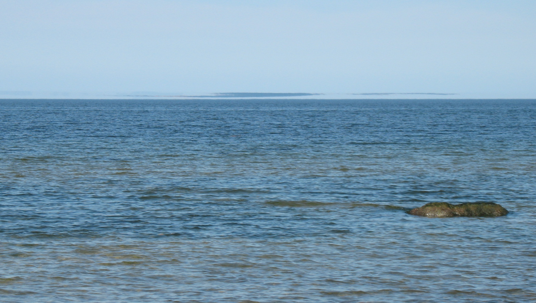 Terendus Karepal. Tume viirg taevas võib olla umbes 80 km kaugusel teiselpool Soome lahte olev Soome lõunarannik.